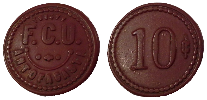 Ficha de 10 centavos utilizada en el Ferrocarril Urbano de Antofagasta (c. 1900).